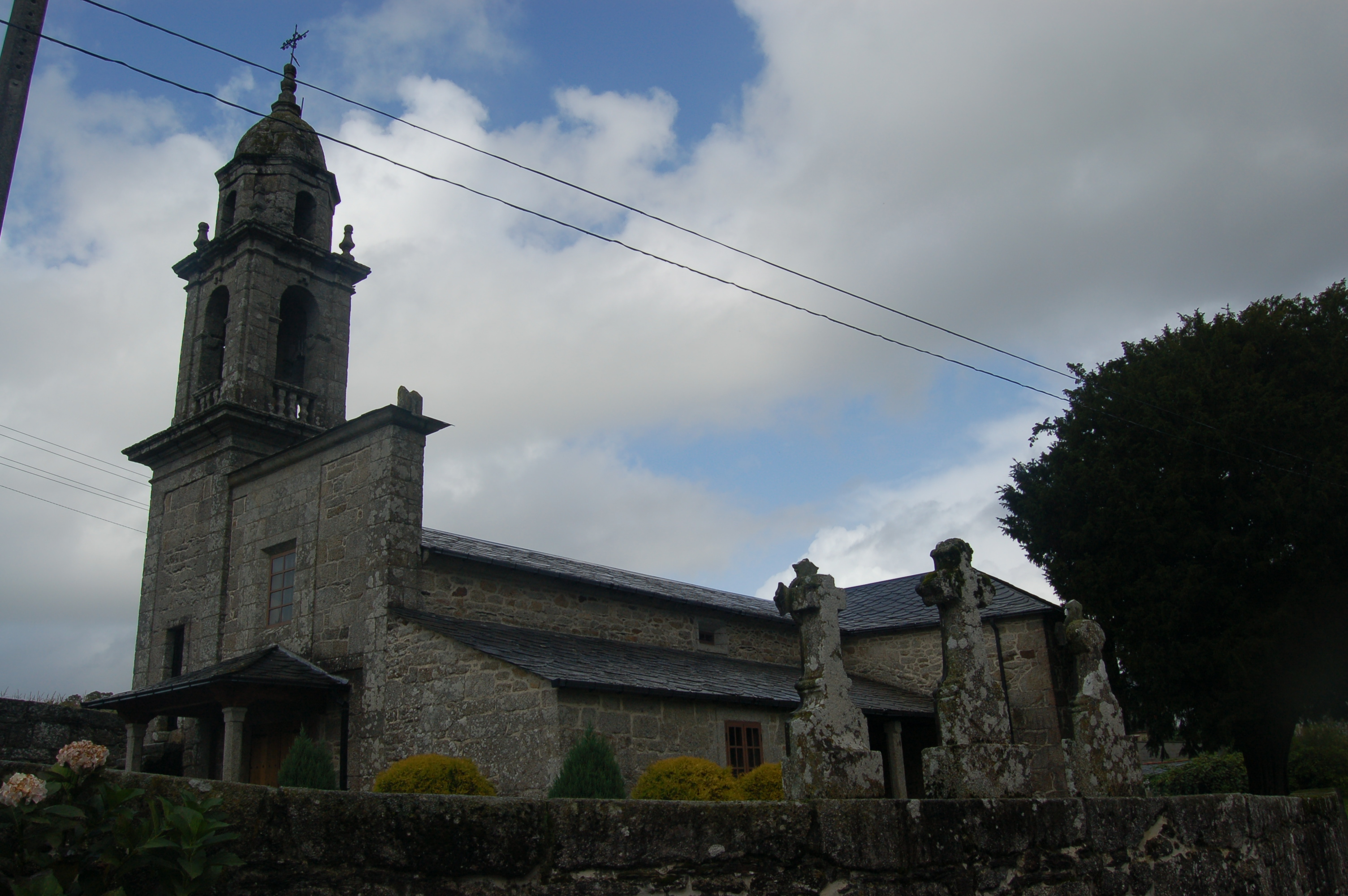 Igrexa parroquial da Santiago da Capela (A Capela)